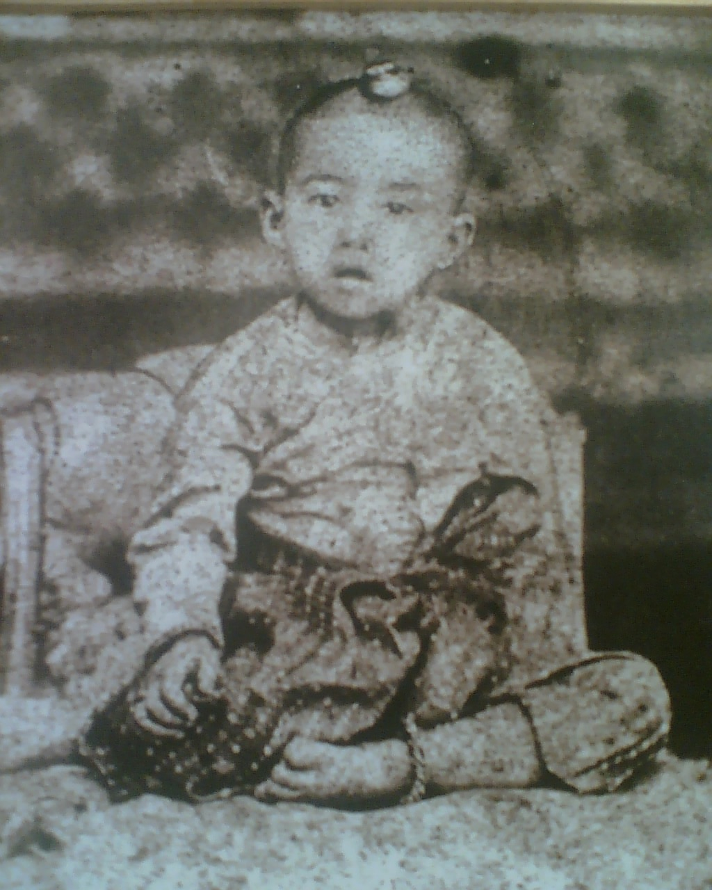 พระรุปทูลกระหม่อมหญิงสุทธาทิพย์เมื่อครั้งทรงพระเยาว์ ก่อนโสกันต์